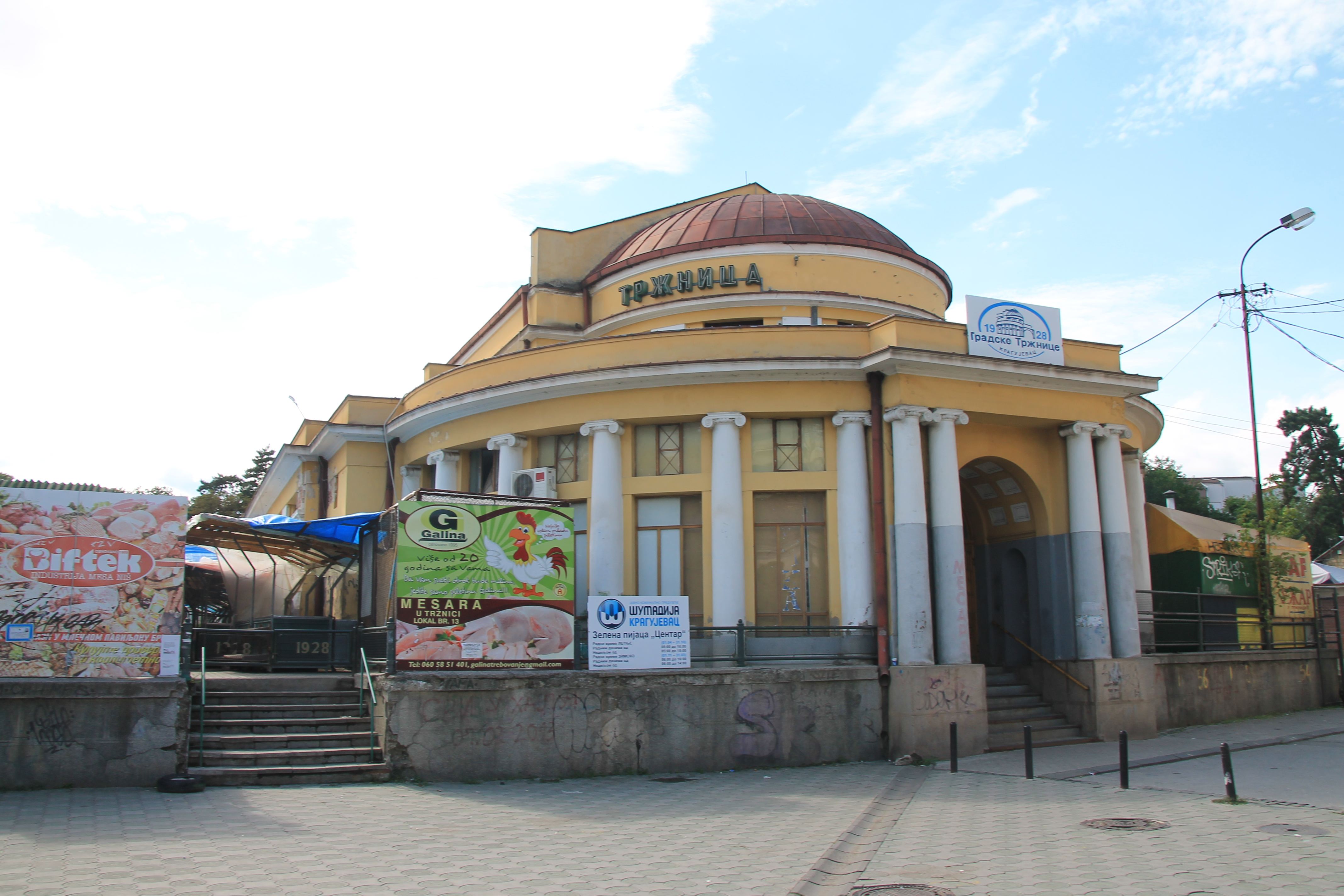 Buildings in Kragujevac